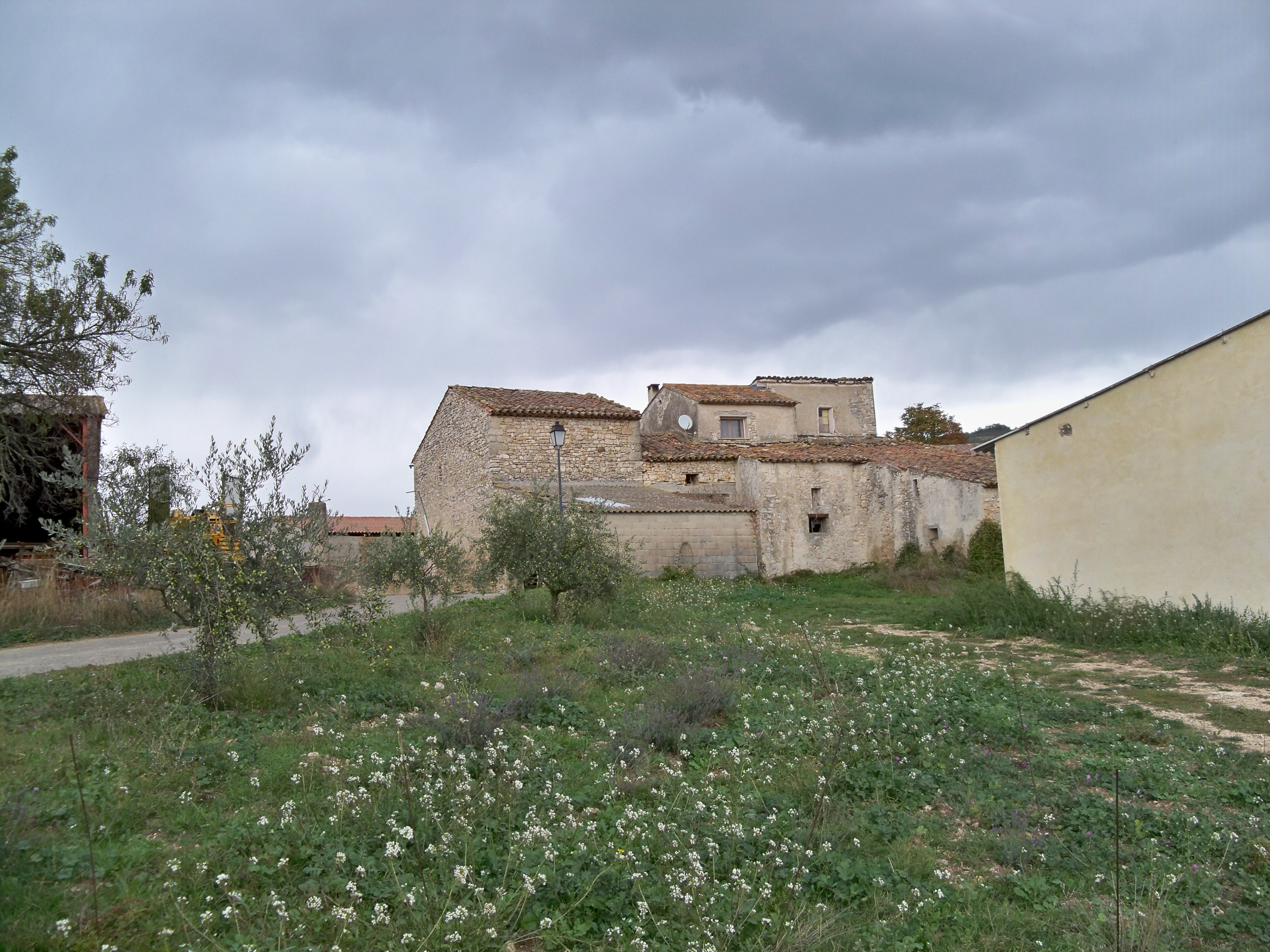 Hameau le Boisset, Vauluse, France